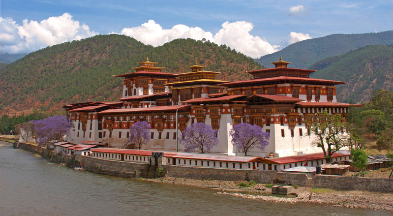 Puntang Dechen Phodrang Dzong in Punakha, or "Punakha Dzong" , Bhutan